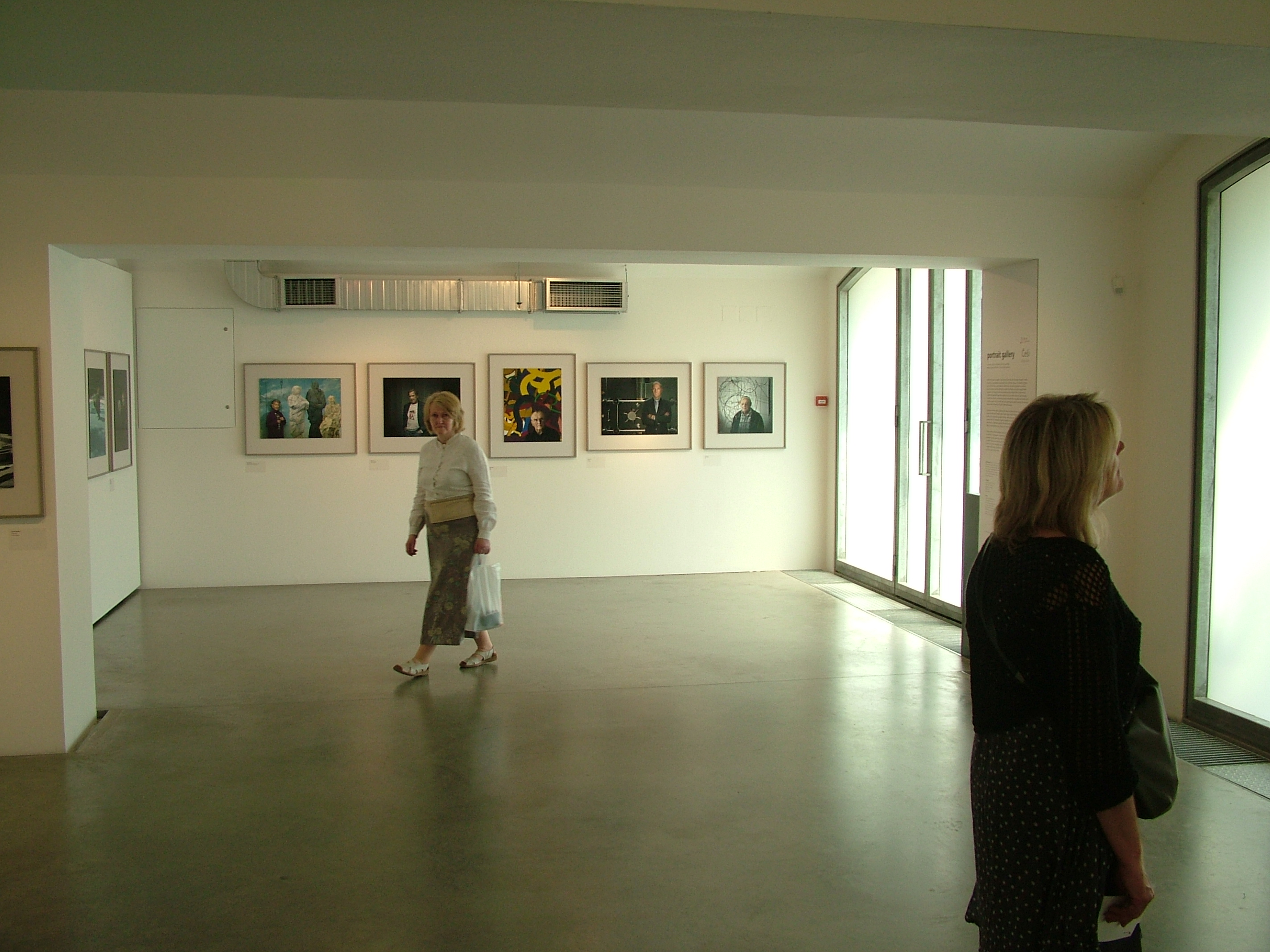 Výstava portrétních fotografií Češi, Kampa Museum, Praha, 2011